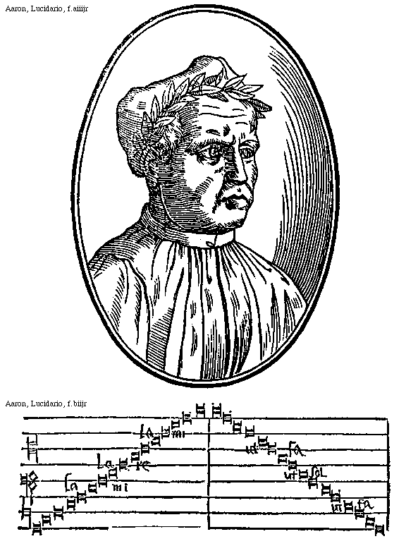 Wizerunek anonimowego autora przedstawiający włoskiego teoretyka muzyki Pietra Aarona pochodzący z traktatu Lucidario in musica wydanego w Wenecji w 1545 roku.